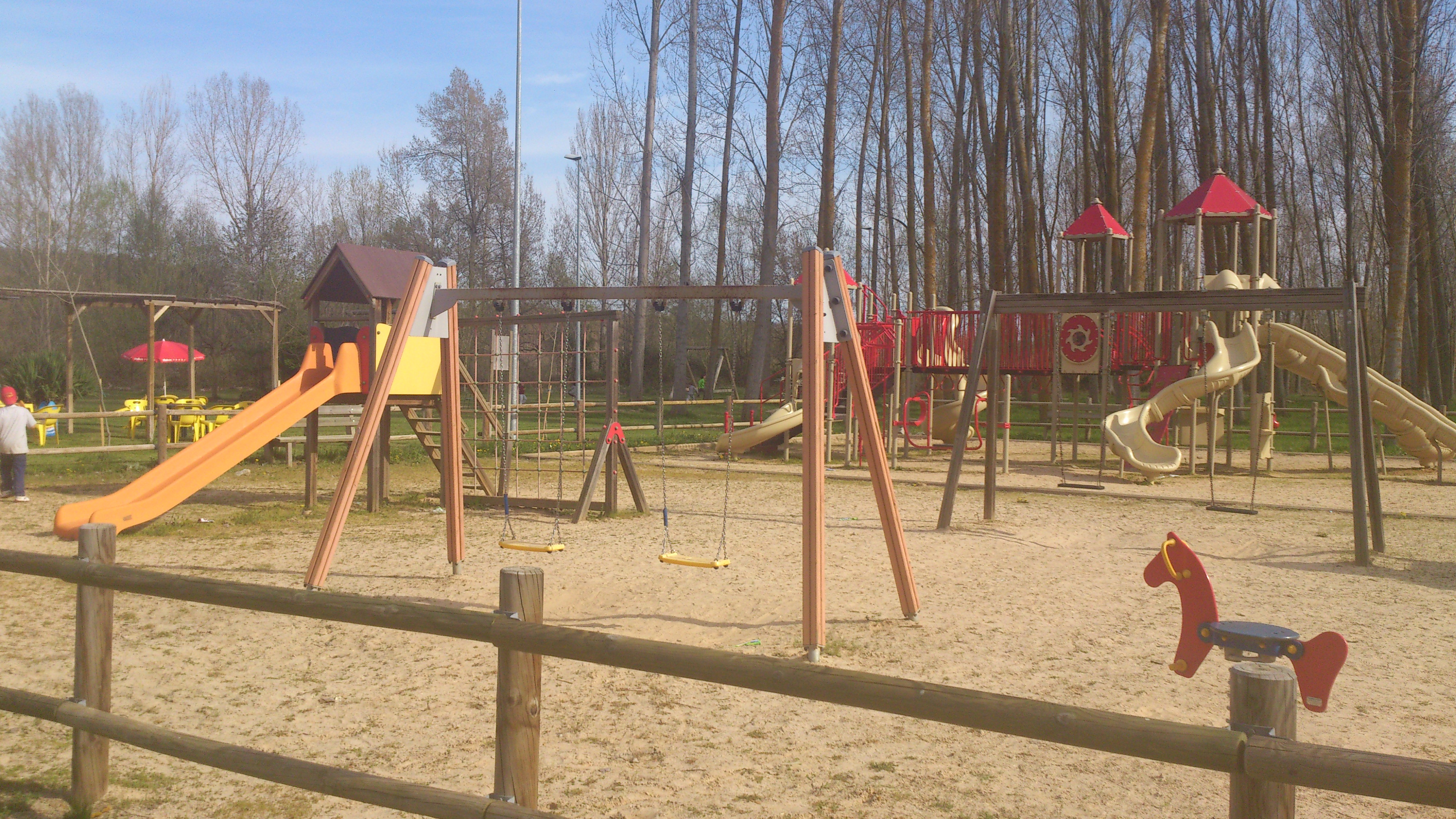 Columpios en el camping de Llamas de la Ribera.